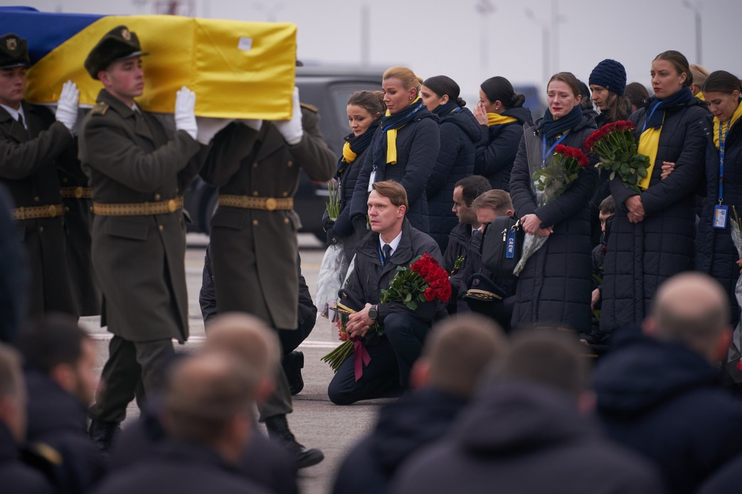 Церемонія вшанування пам’яті загиблих унаслідок авіакатастрофи в Ірані